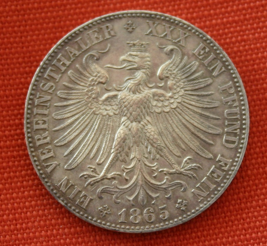 Vereinsthaler von 1865 der Freien Stadt Frankfurt